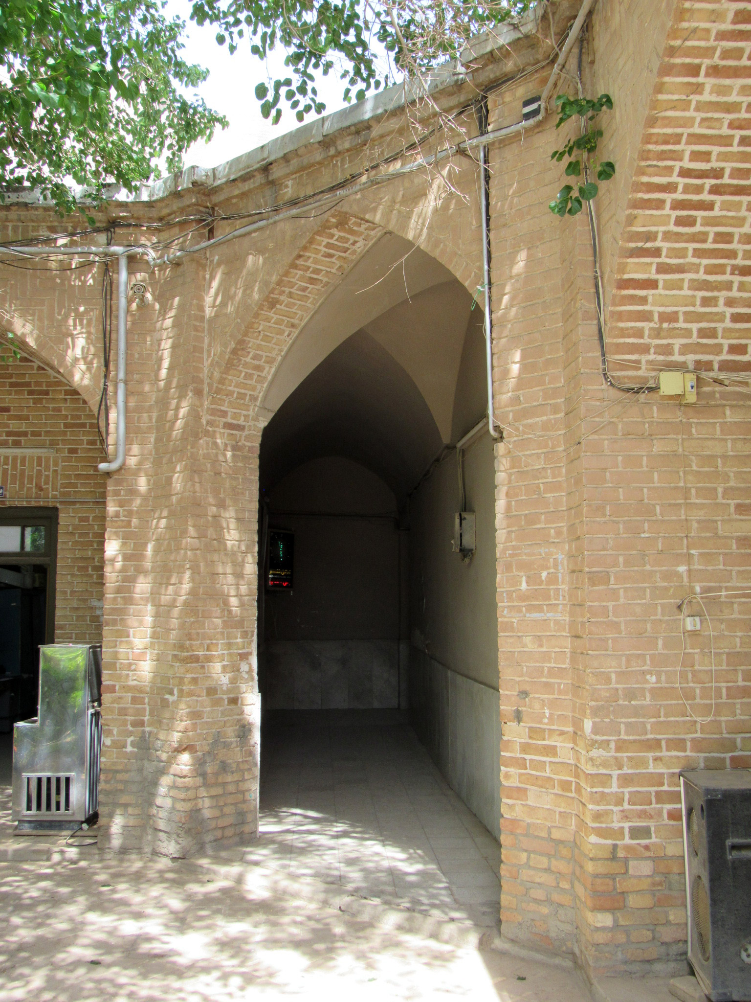 ورودی مدرسه تاریخی محمدیه در سبزوار